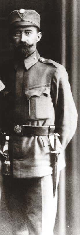 Лонгин Цесельский